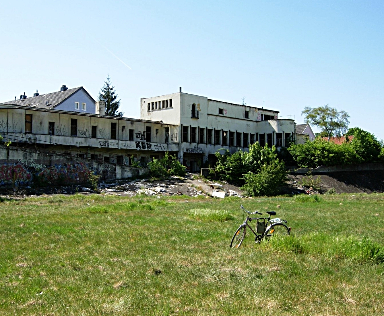 Altes Poststadion am Lievelingsweg in Bonn (Nordstadt), Blick vom Spielfeld über die Radrennbahn nach Westen auf das Stadiongebäude, wo 2007 noch zwei Hinweise zu lesen waren: Neben einem herausgebrochenen Medaillon die ramponierte Inschrift Dem Schöpfer dieser Sportanlage des Bonner Turnvereins 1860 e.V. Heinrich Schneiders Dr jur und auf einem Blechschild Post-Sportverein Bonn e.V. 1926 Geschäfts- und Schachräume Lievelingsweg 88a. Weitere Erläuterungen bei diesem Bild aus dem Jahre 2005.